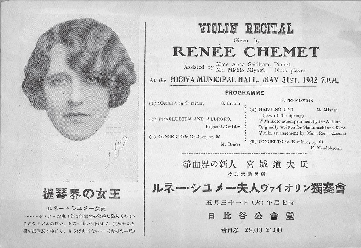 ルネー・シュメー夫人ヴァイオリン獨奏會 昭和7年の5月31日に開催されたルネ・シュメー、アンカ・サイドローヴァ、宮城道雄による演奏会のパンフレット